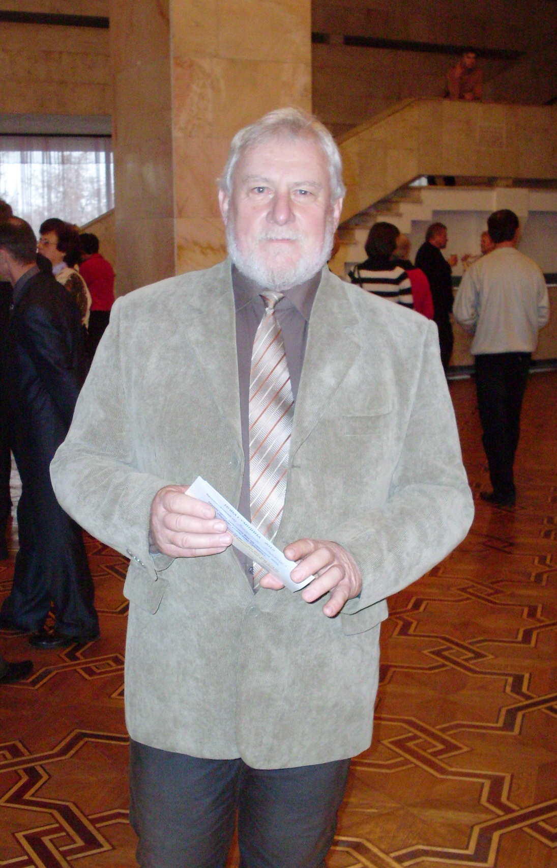 Володимир Хорунжий у 2011 році